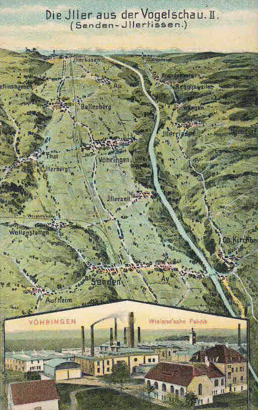 Ansichtskarte von Eugen Felle; Technoseum (Landesmuseum für Technik und Arbeit Mannheim) Motiv: Die Iller aus der Vogelschau 2, mit Ansicht der Wieland'schen Fabrik in Vöhringen